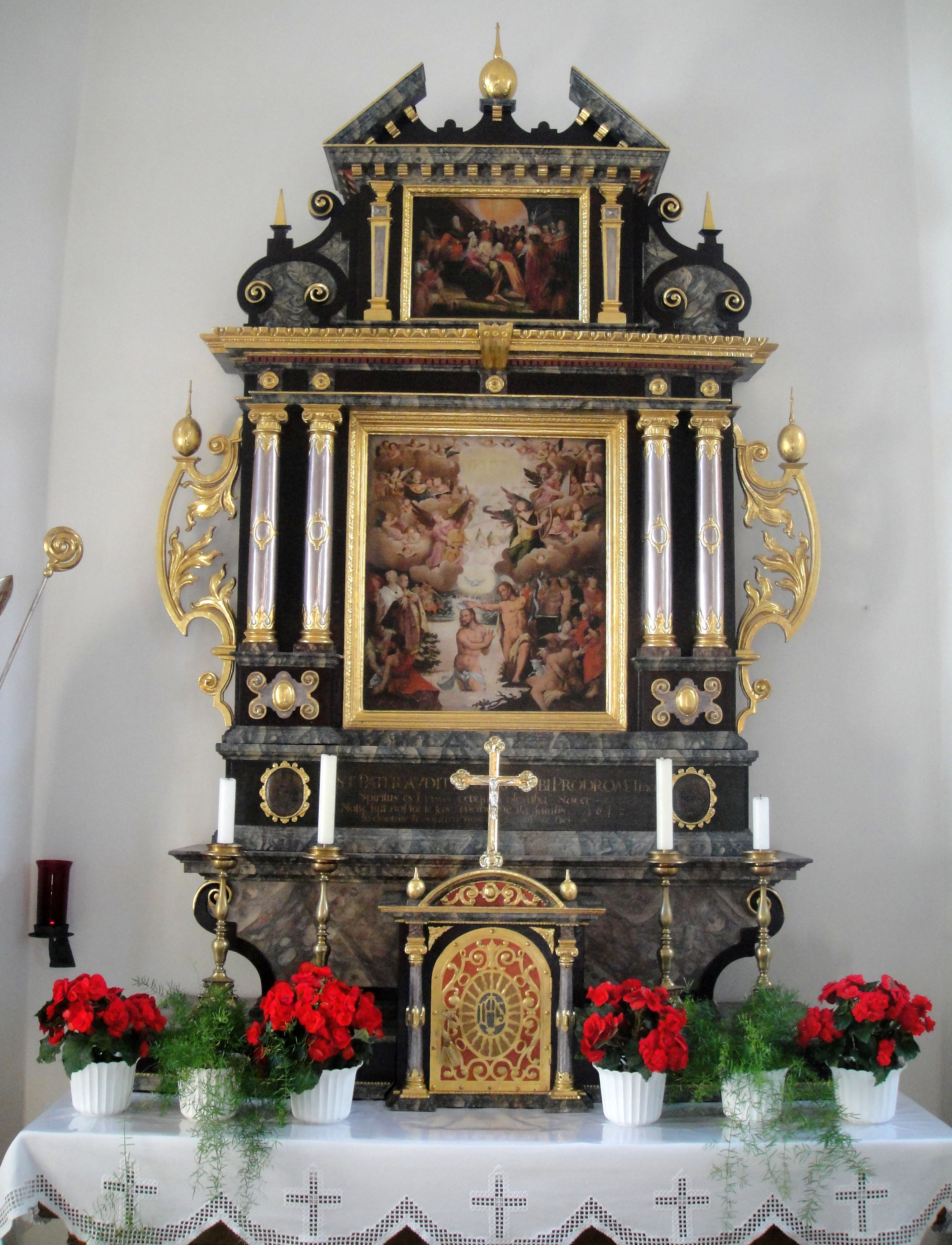 Altar der Schlosskappelle Altenweiher. Seite 1937 am neuen Standort in Dürnast. Frühbarocker Altar mit Tafelbildern des Malers Krapp.